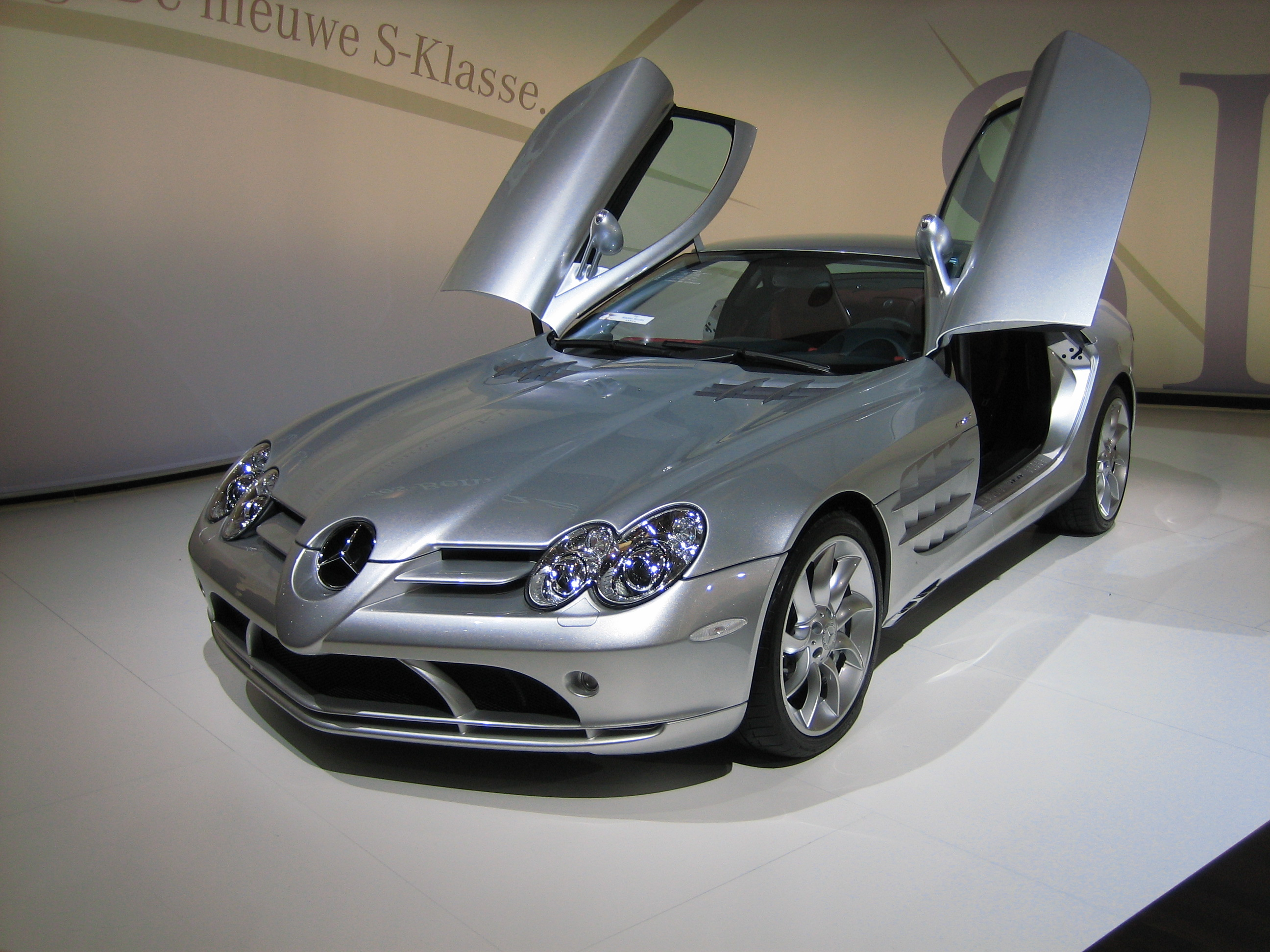 Mercedes-Benz SLR McLaren (Brussel 2006)